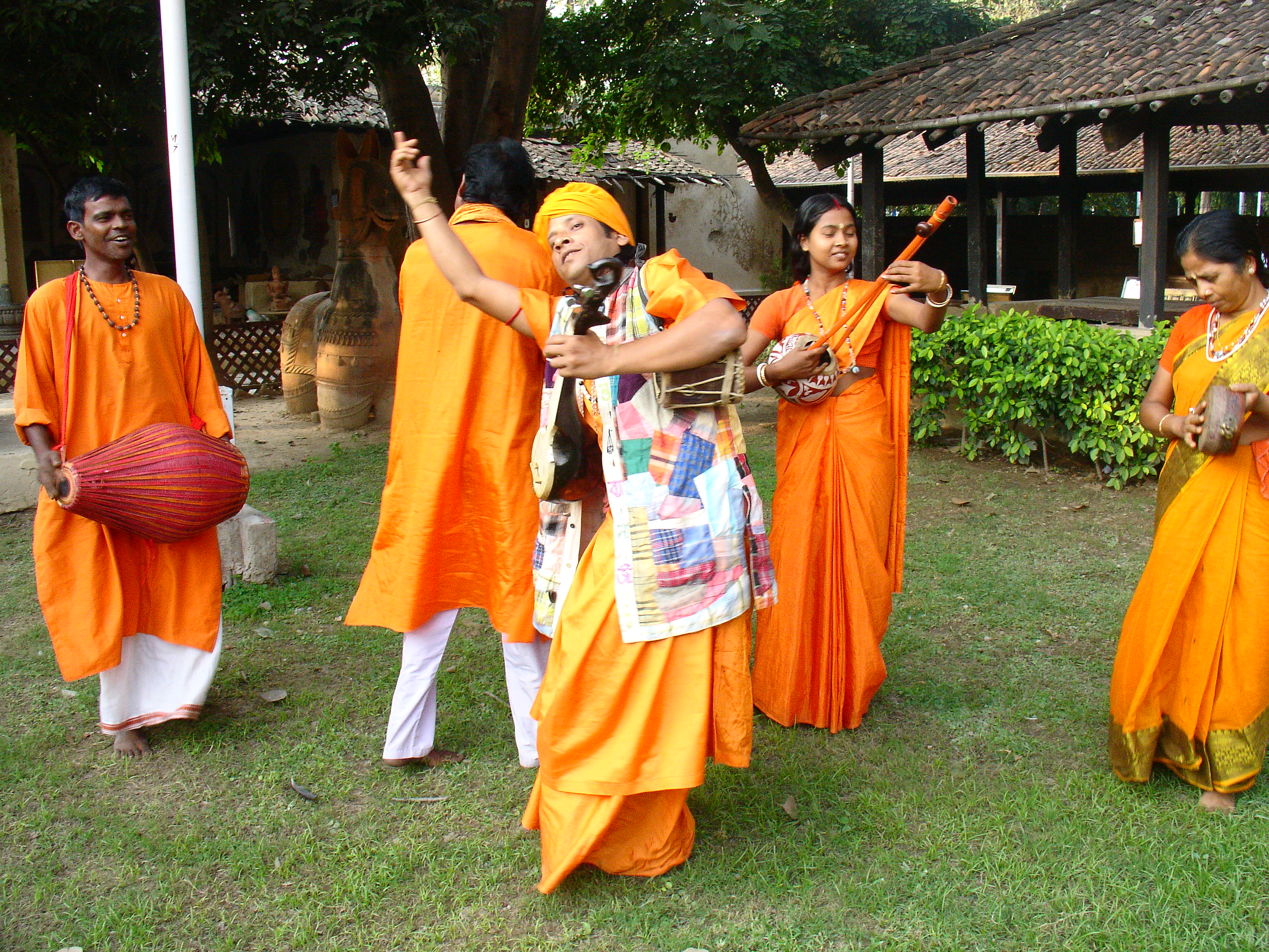 पंशिचम् बंगाल का बाउल फोक गायन